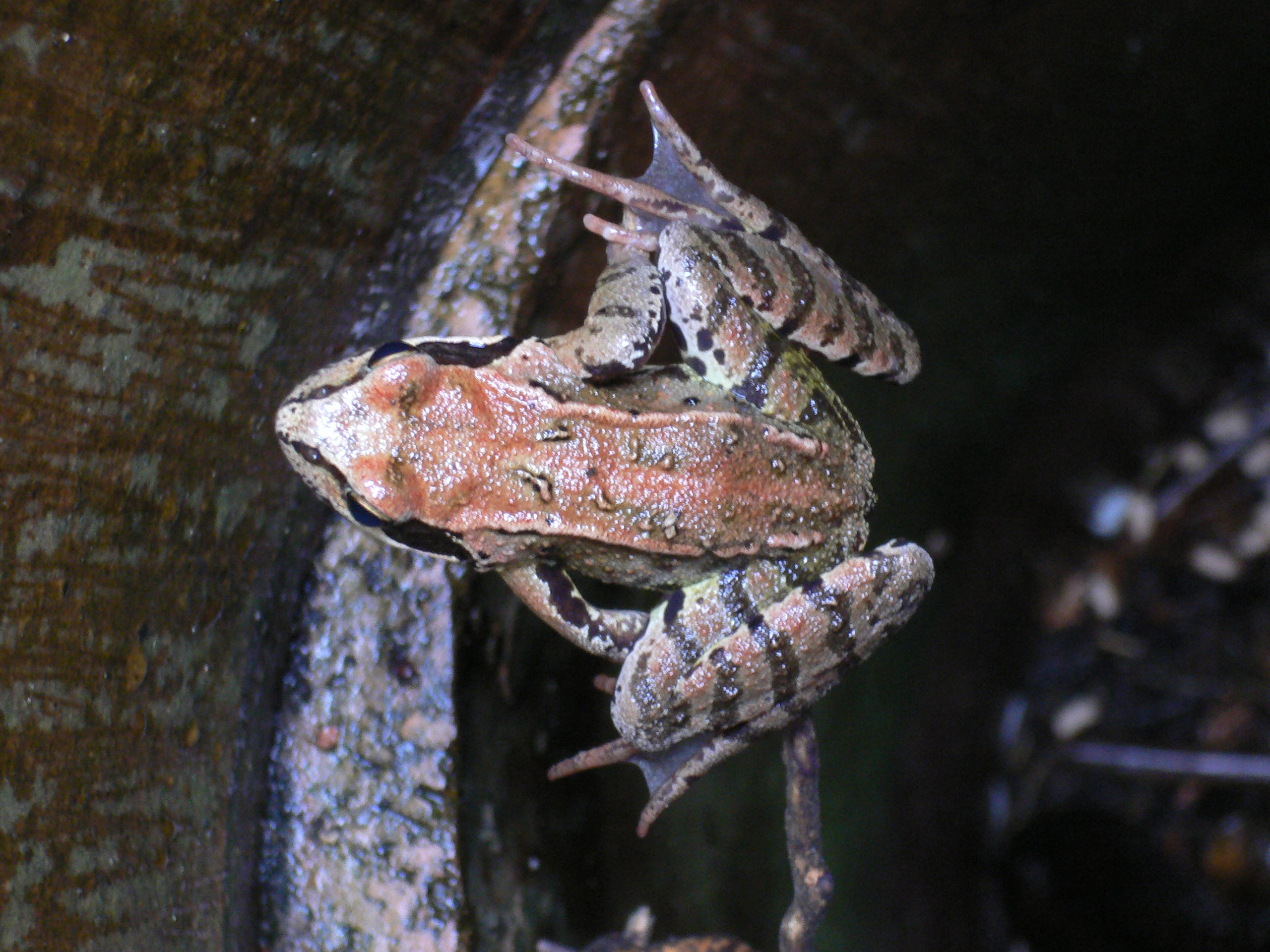 Grasfrosch, Düsseldorf